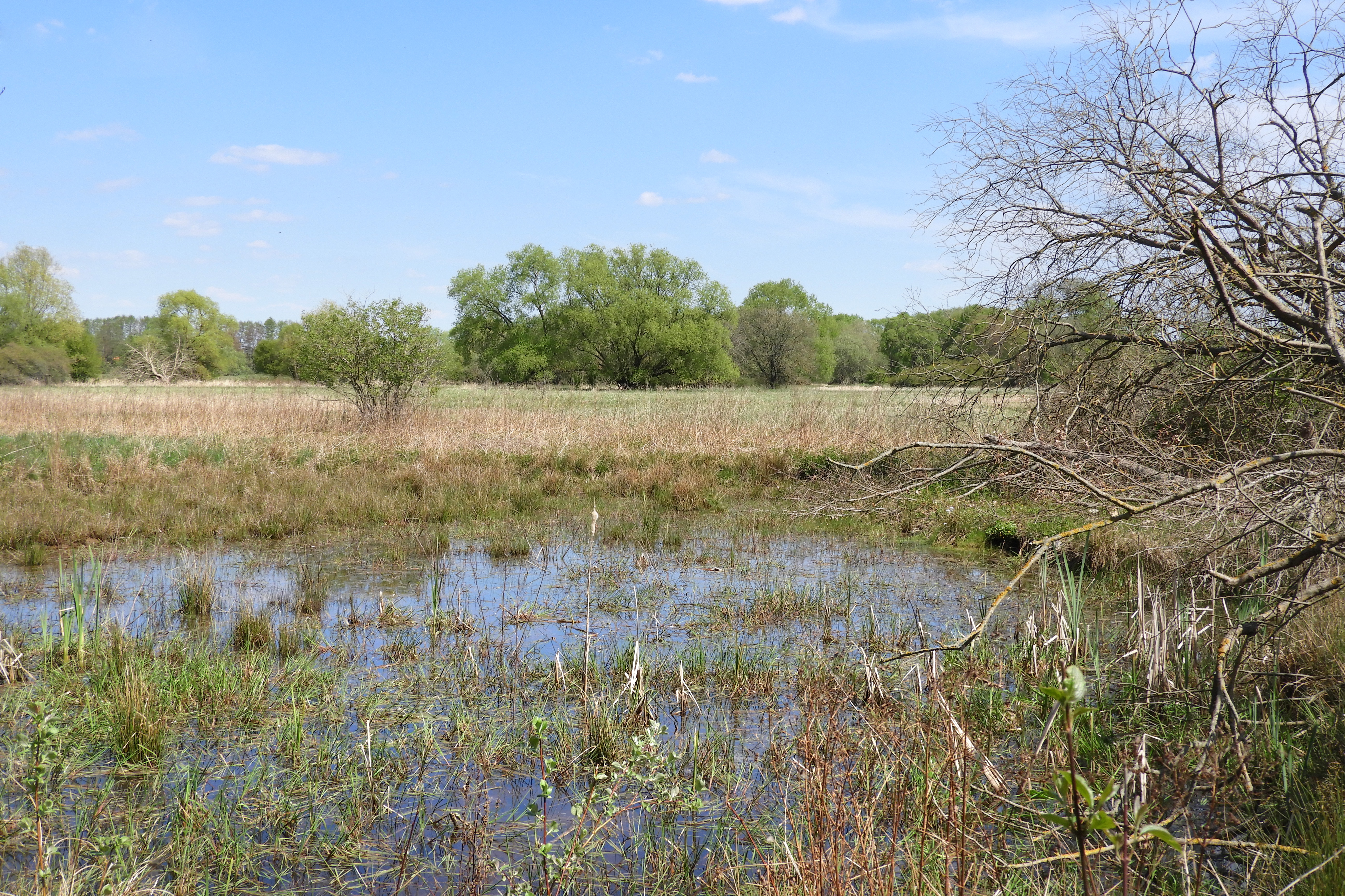 Die Obersuhler Aue im nordosthessischen Landkreis Hersfeld-Rotenburg ist ein großflächiger offener Grünlandbereich. Das durch traditionelle Beweidung und Mahd entstandene Gebiet, das mit drei Seiten an Thüringen grenzt, ist zum Lebensraum für viele schutzwürdige Pflanzen- und Tierarten geworden. Um die unterschiedlich feuchten Wiesen und Brachflächen zu bewahren und zu schützen, wurde die Aue im Jahr 1990 zum Naturschutzgebiet erklärt und später als ein Flora-Fauna-Habitat-Gebiet in dem europaweiten Netz von Schutzgebieten „Natura 2000“ verankert. Als eine von vier Teilflächen gehören die Wiesen auch zu dem Europäischen Vogelschutzgebiet „Rhäden von Obersuhl und Auen an der mittleren Werra“, das als wichtiges Brut- und Rastgebiet für bestandsgefährdete Vogelarten gilt.